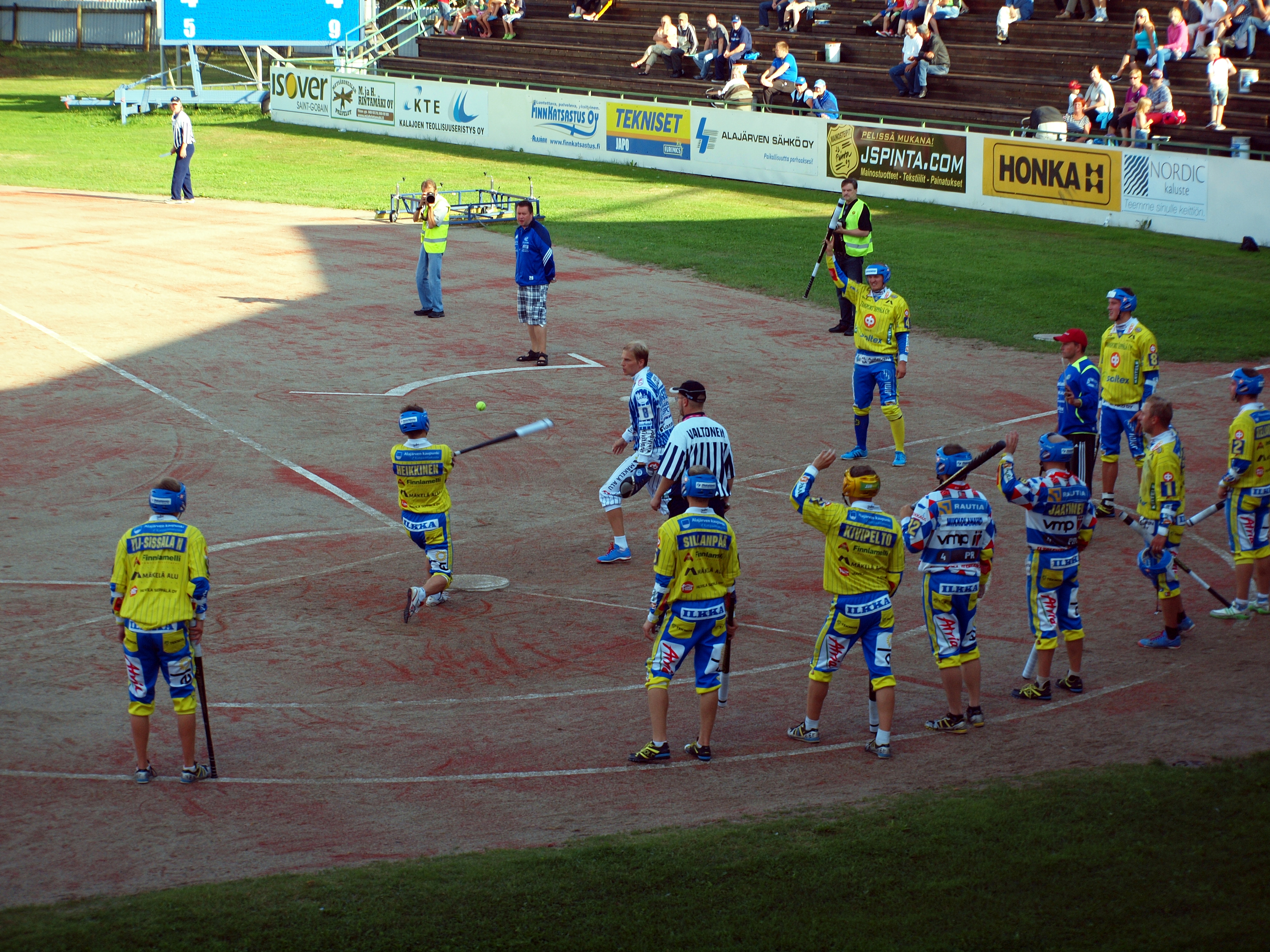 Alajärven Ankkurit - Vimpelin Veto pesäpallo-ottelu 10.8.2014.